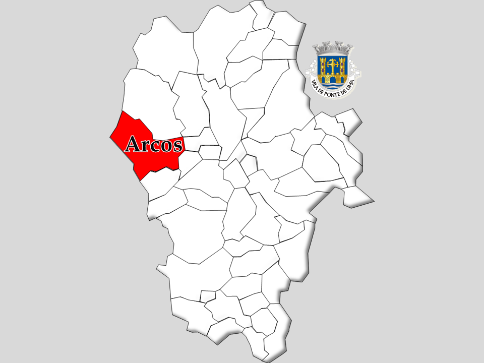 Censos 1864/2011